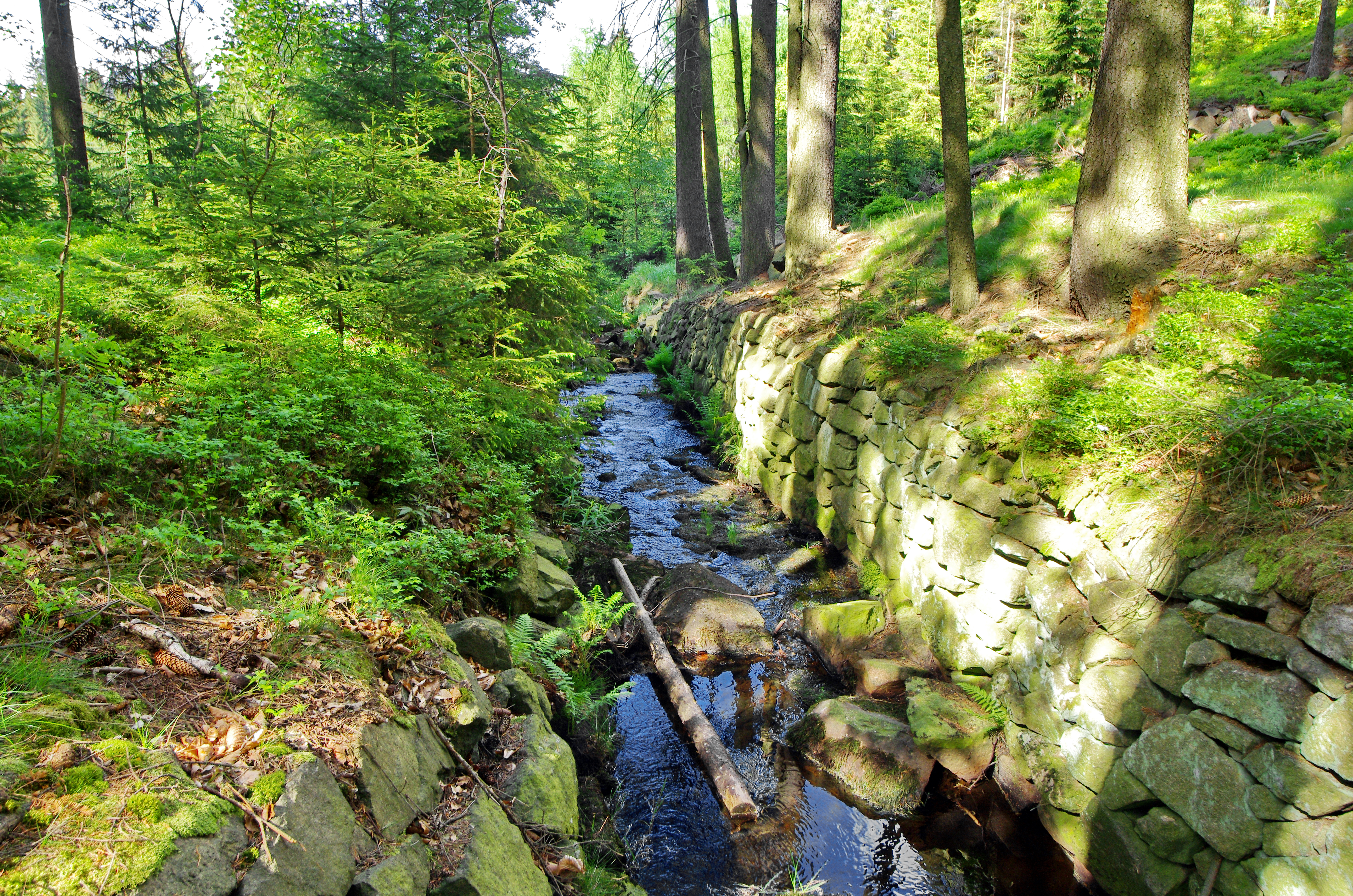 Potok Puškařovská stoka, Slavkovský les, okres Sokolov